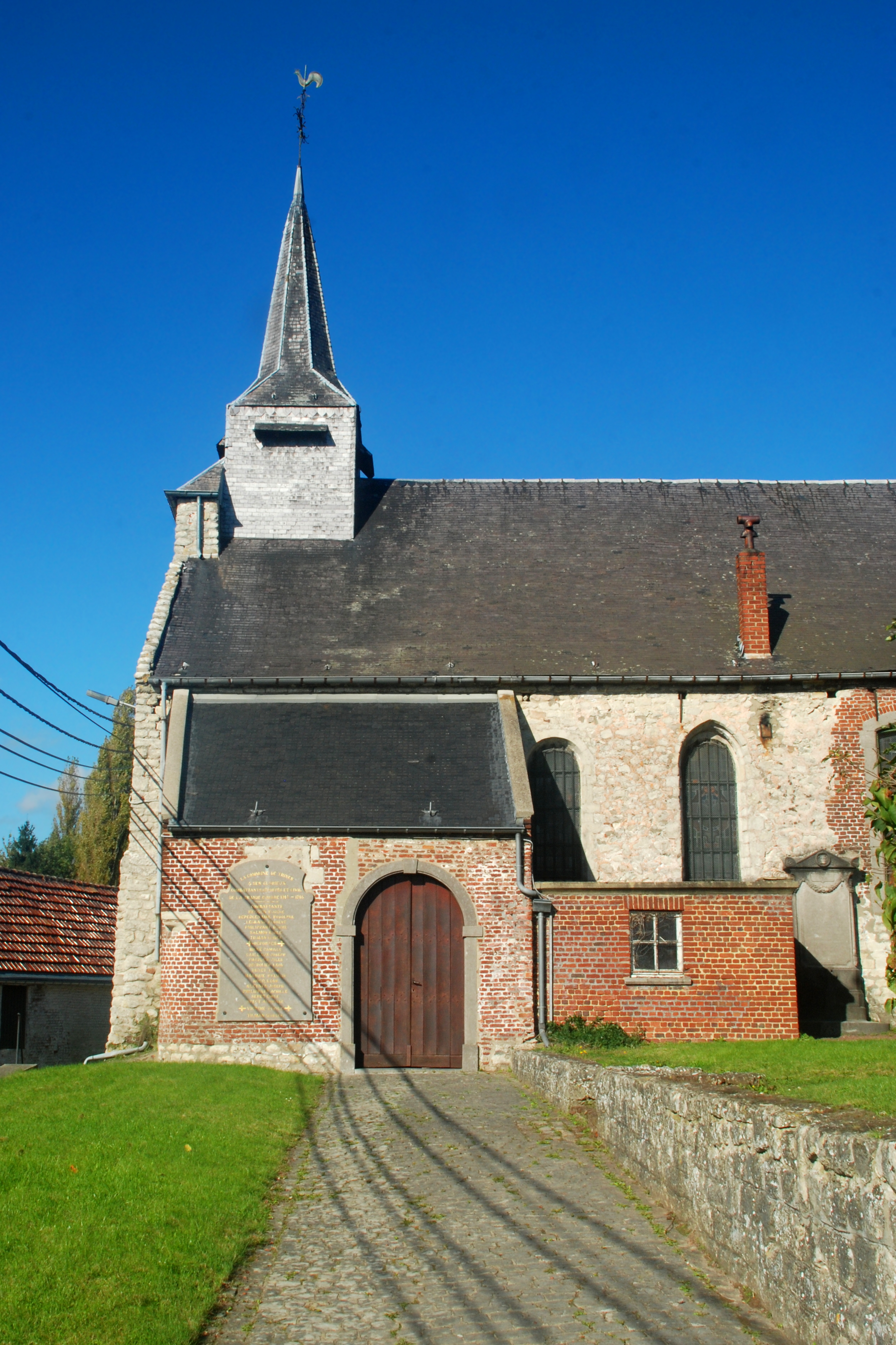 Belgique - Brabant wallon - Nivelles - Eglise Sainte-Marguerite de Thines